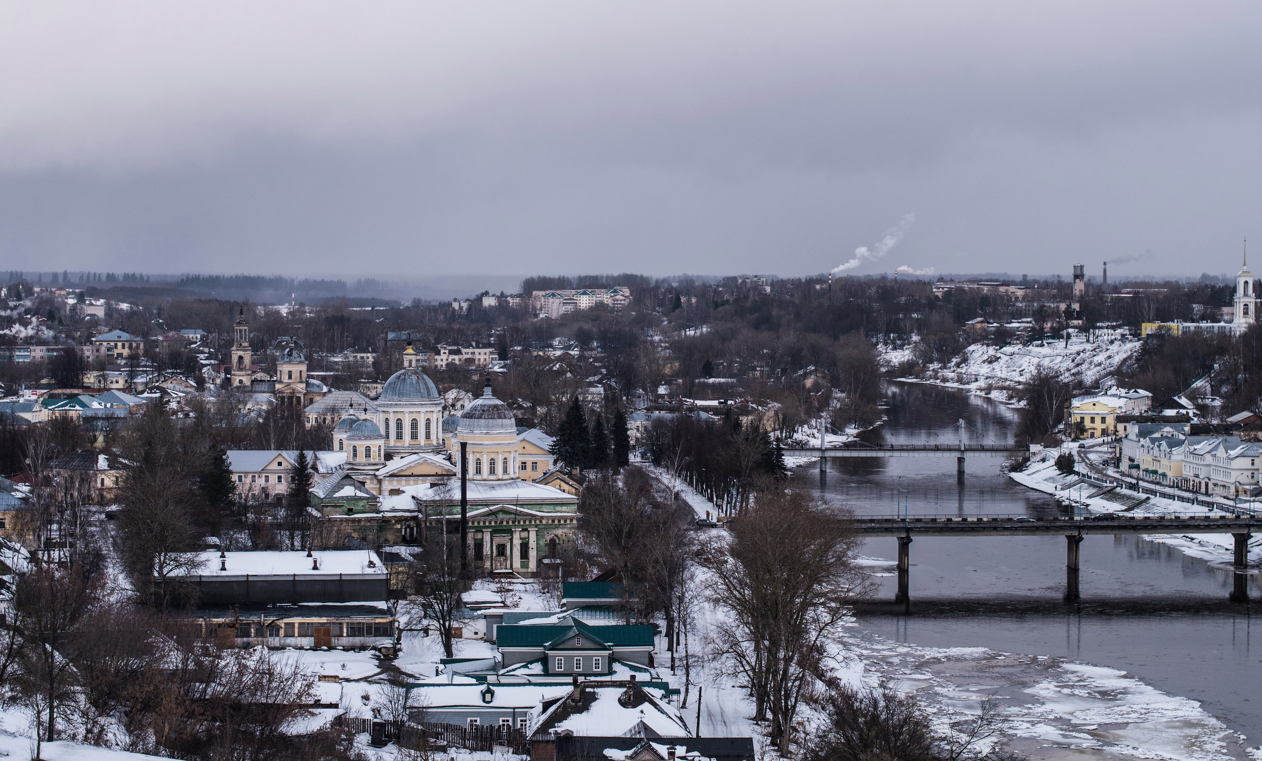 Борисоглебский монастырь на реке Тверца, вид на город Торжок с В центре: Борисоглебский собор (построен в 1796 г., с двумя приделами Преподобного Ефрема Новоторжского и Аркадия)